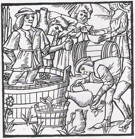 Chaulage du vin, au XVème siècle